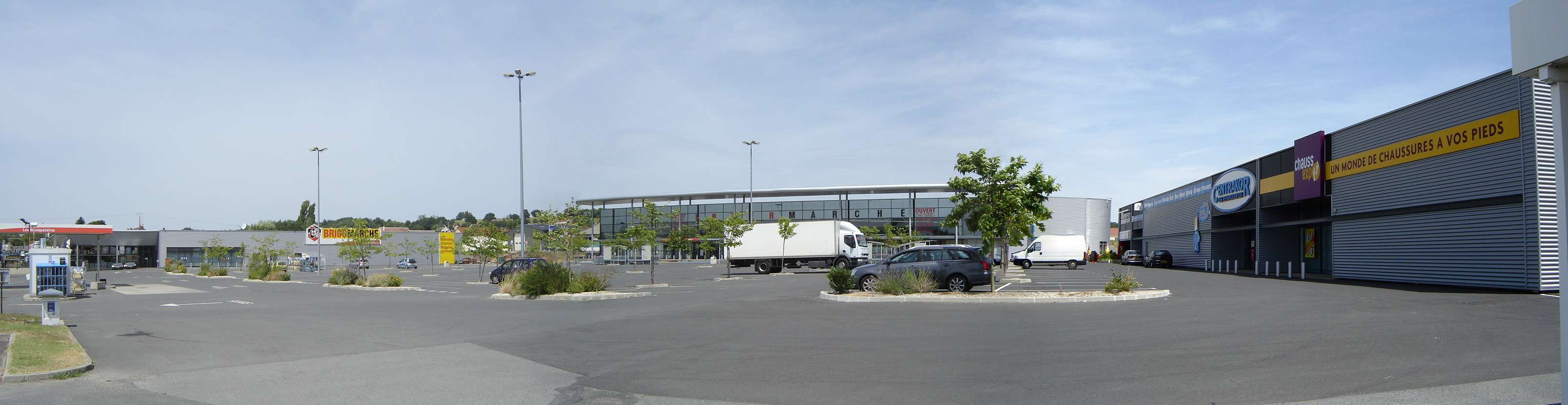 Panorama Zone Commerciale Les Chalussons